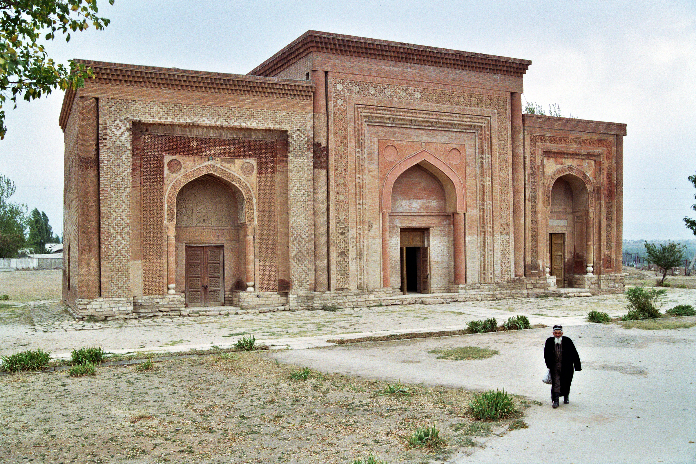 Karakhanids dynasty mausoleum X-XII, Uzgen, Kyrgyzstan